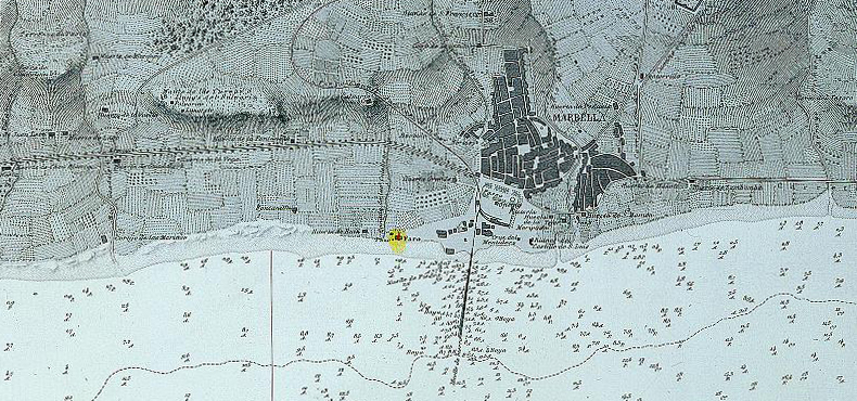 Inserta vista de la zona representada desde el mar. - 10 x 50 cm. Orientado con rosa y flecha e indicando la desviación magnética. - Sondas. - Relieve por sombreado